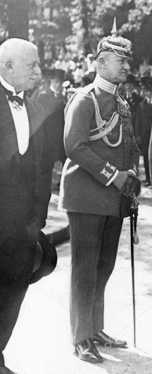 Louis Müldner von Mülnheim mit Uniform